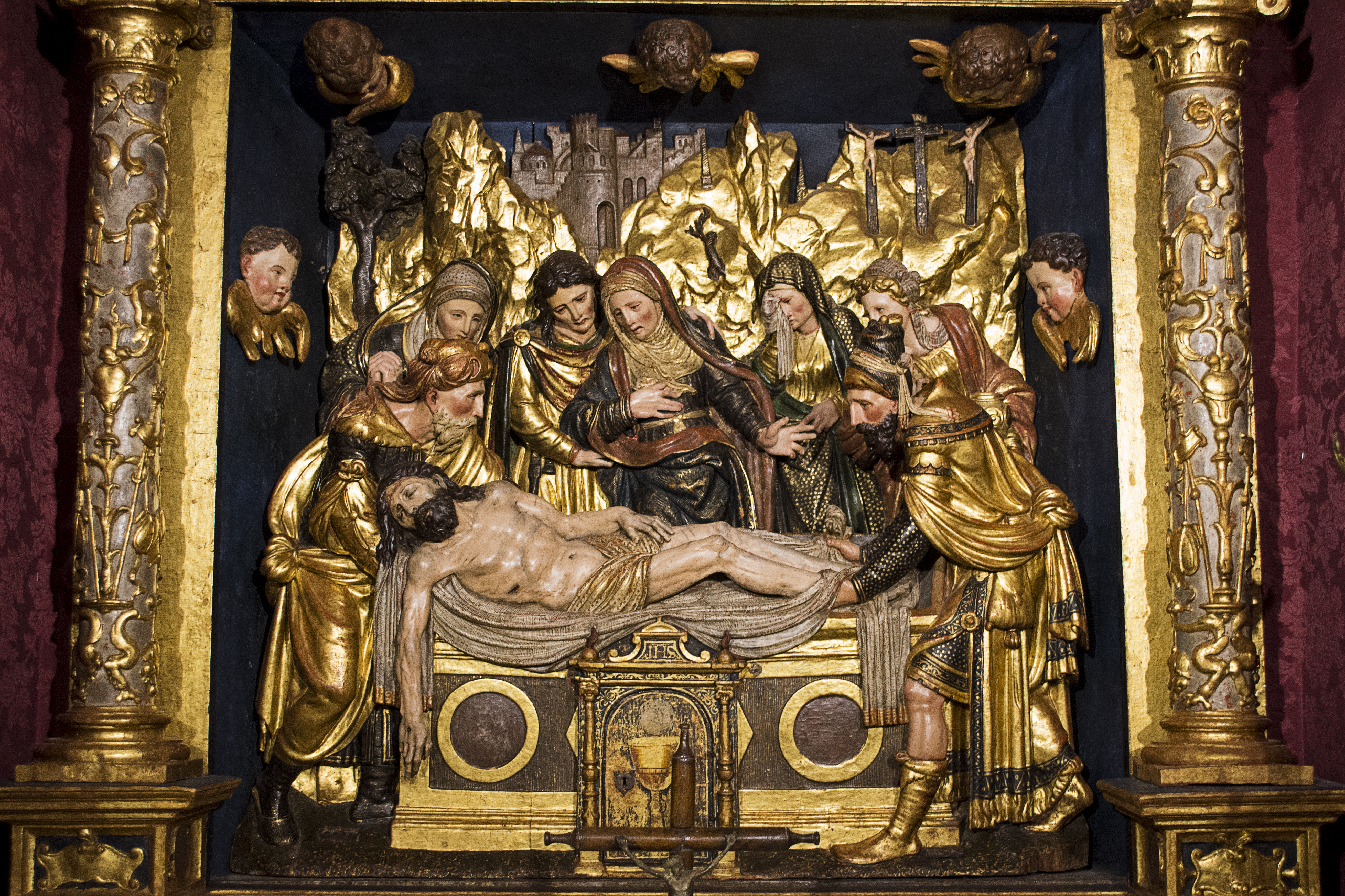 Retablo del entierro de Cristo considerado obra de Roque Balduque. Colegiata de Osuna en Sevilla